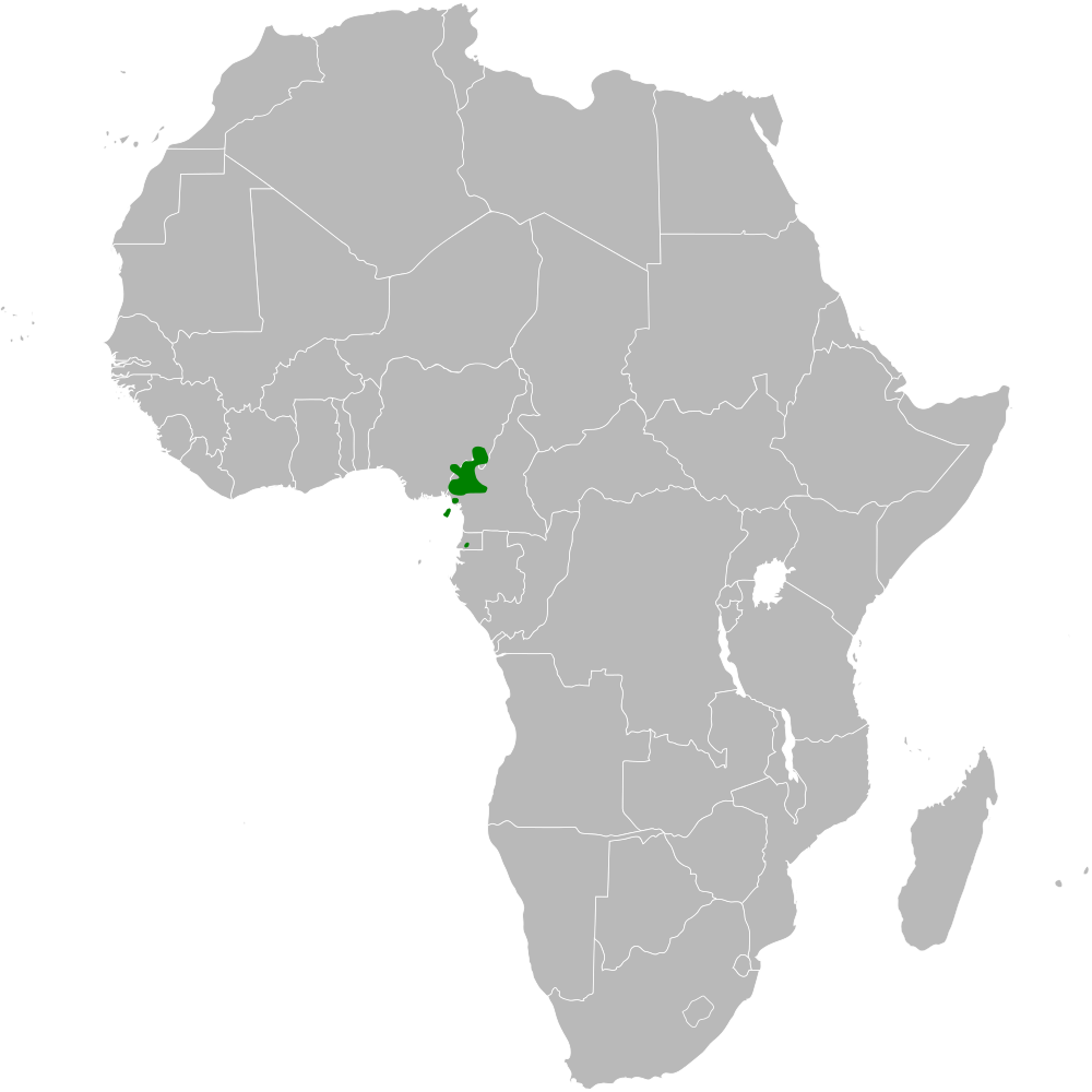 Phylloscopus herberti distribution map, based on